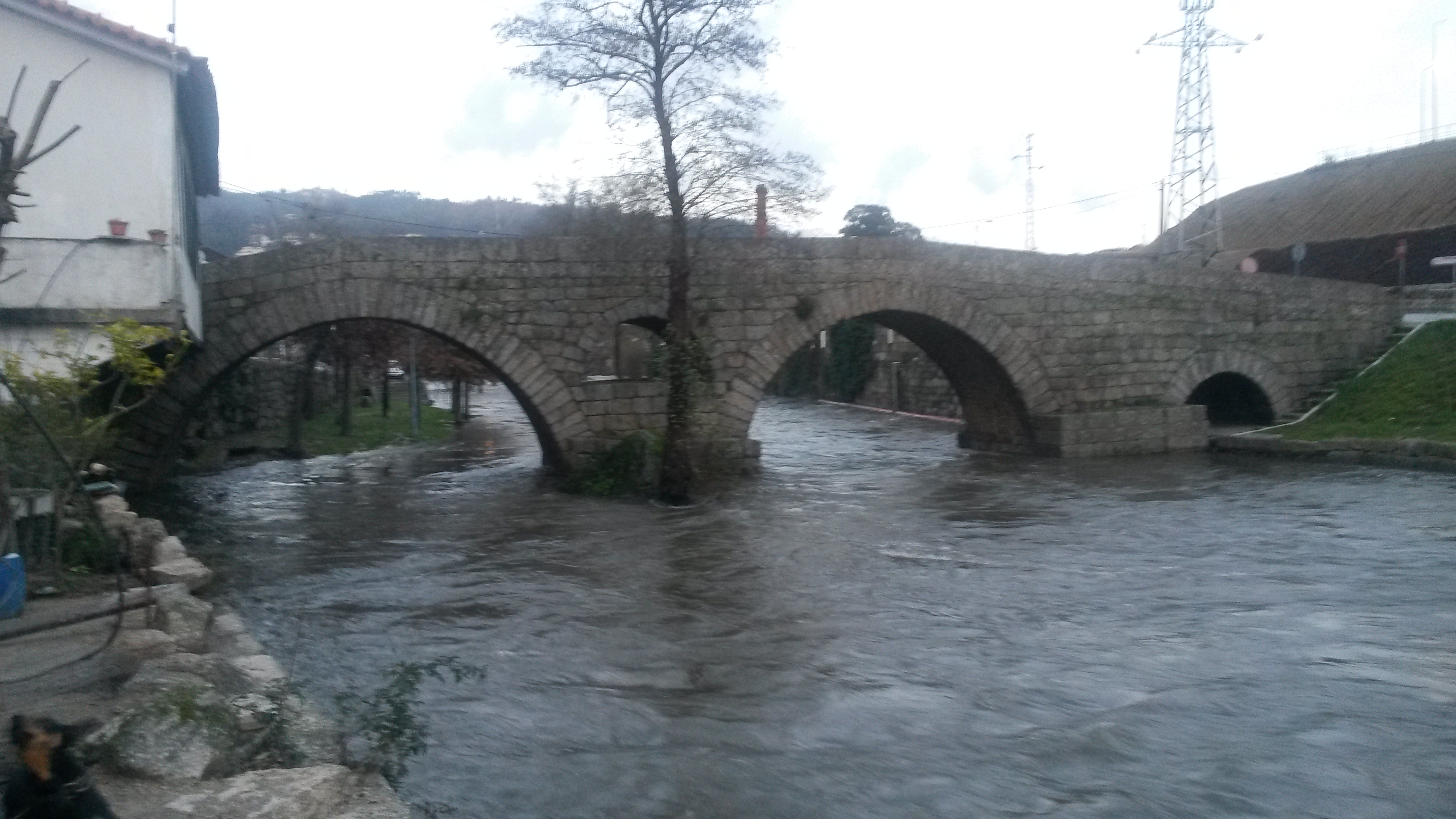 Cheia no rio Vizela